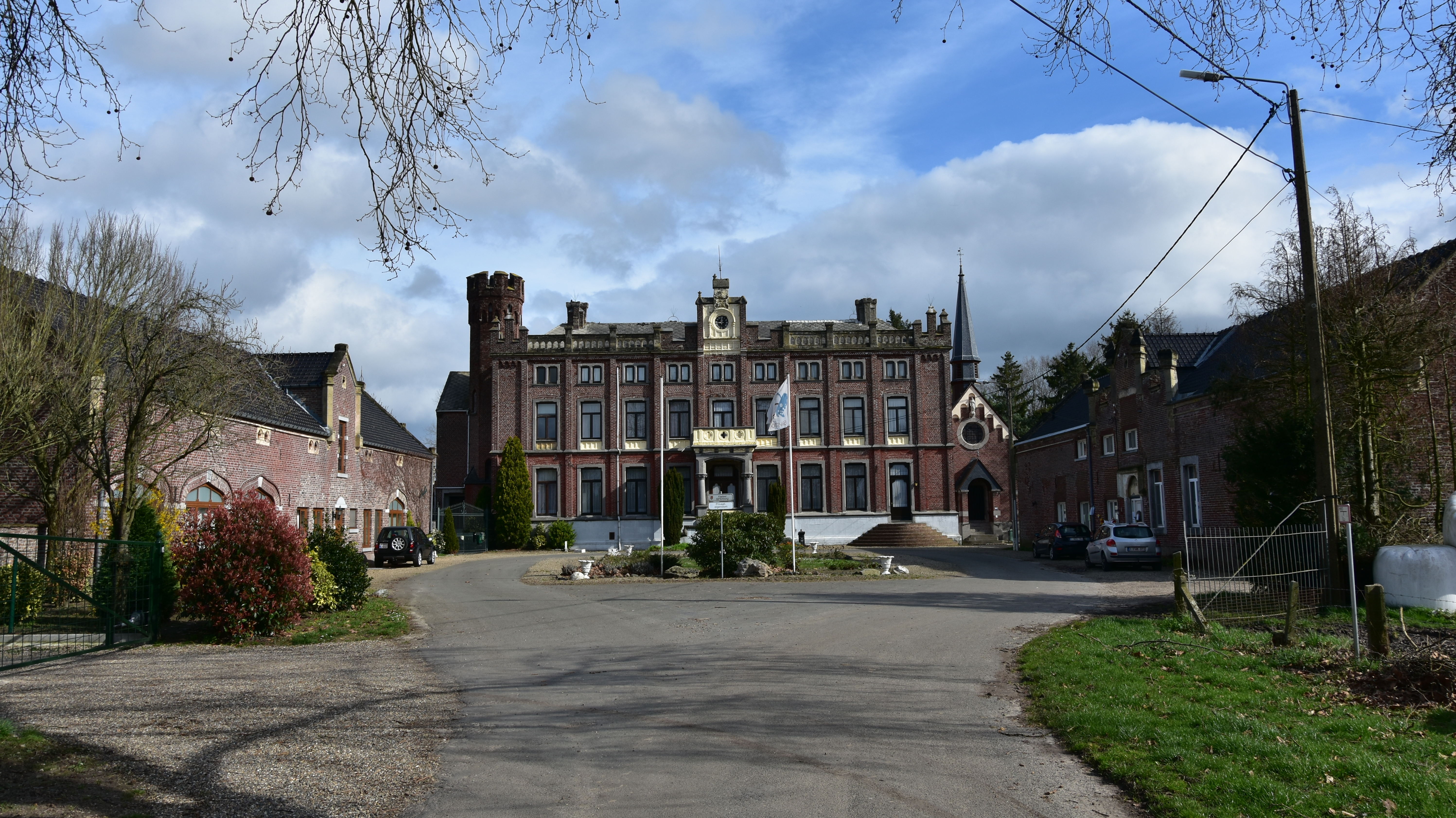 Elen Kasteel Sipernau (71380) 16-03-2020 11-11-49